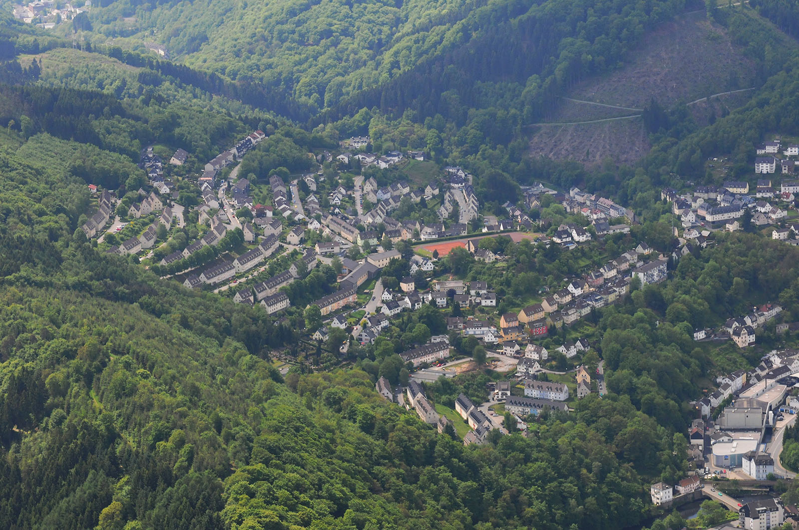 Der Altenaer Ortsteil Breitenhagen aus der Luft betrachtet